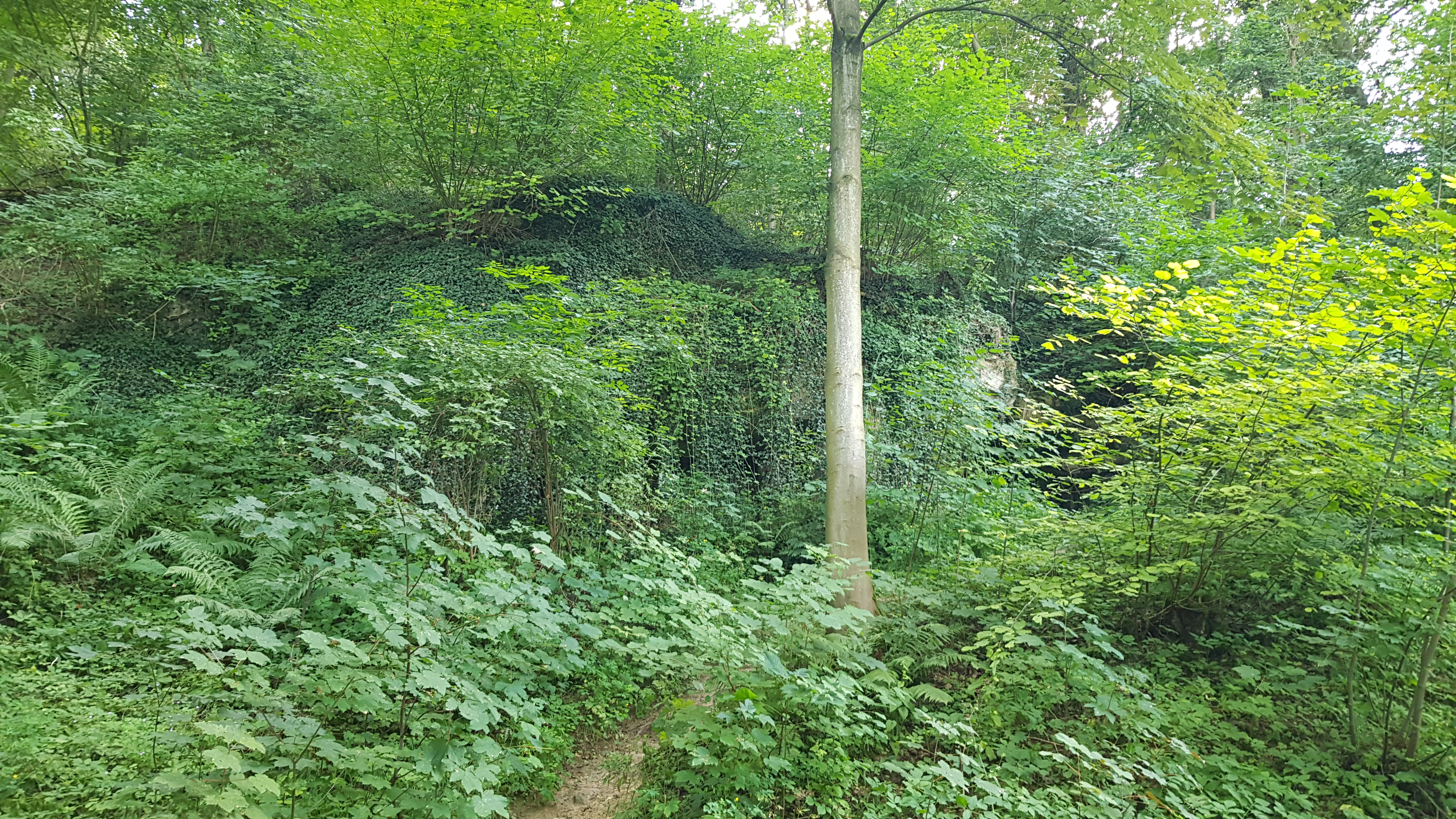 Groeve het Paradijsbergske III, Geulhem, Nederland